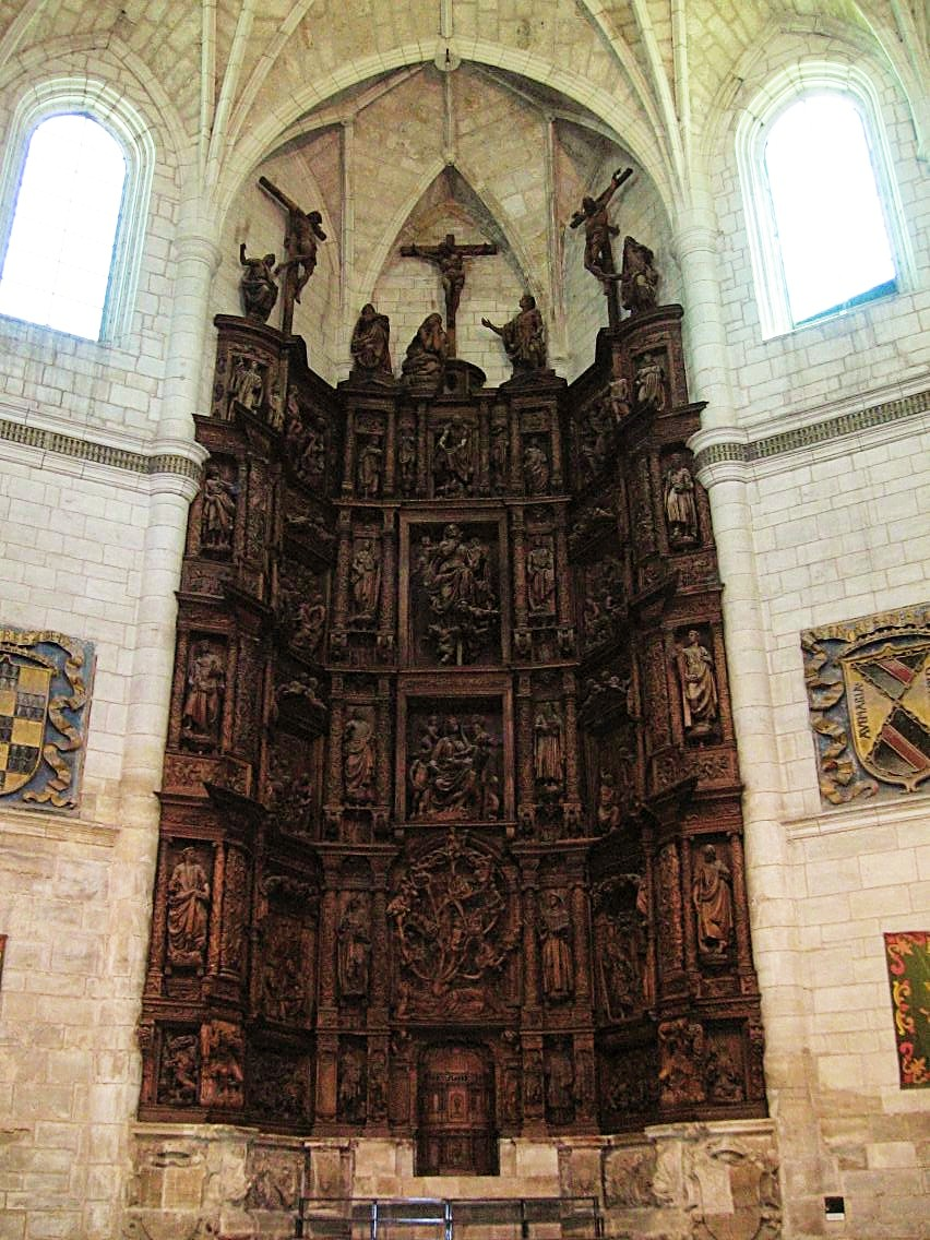 Retablo renacentista del Monasterio de Santa Clara, Briviesca, Burgos, España